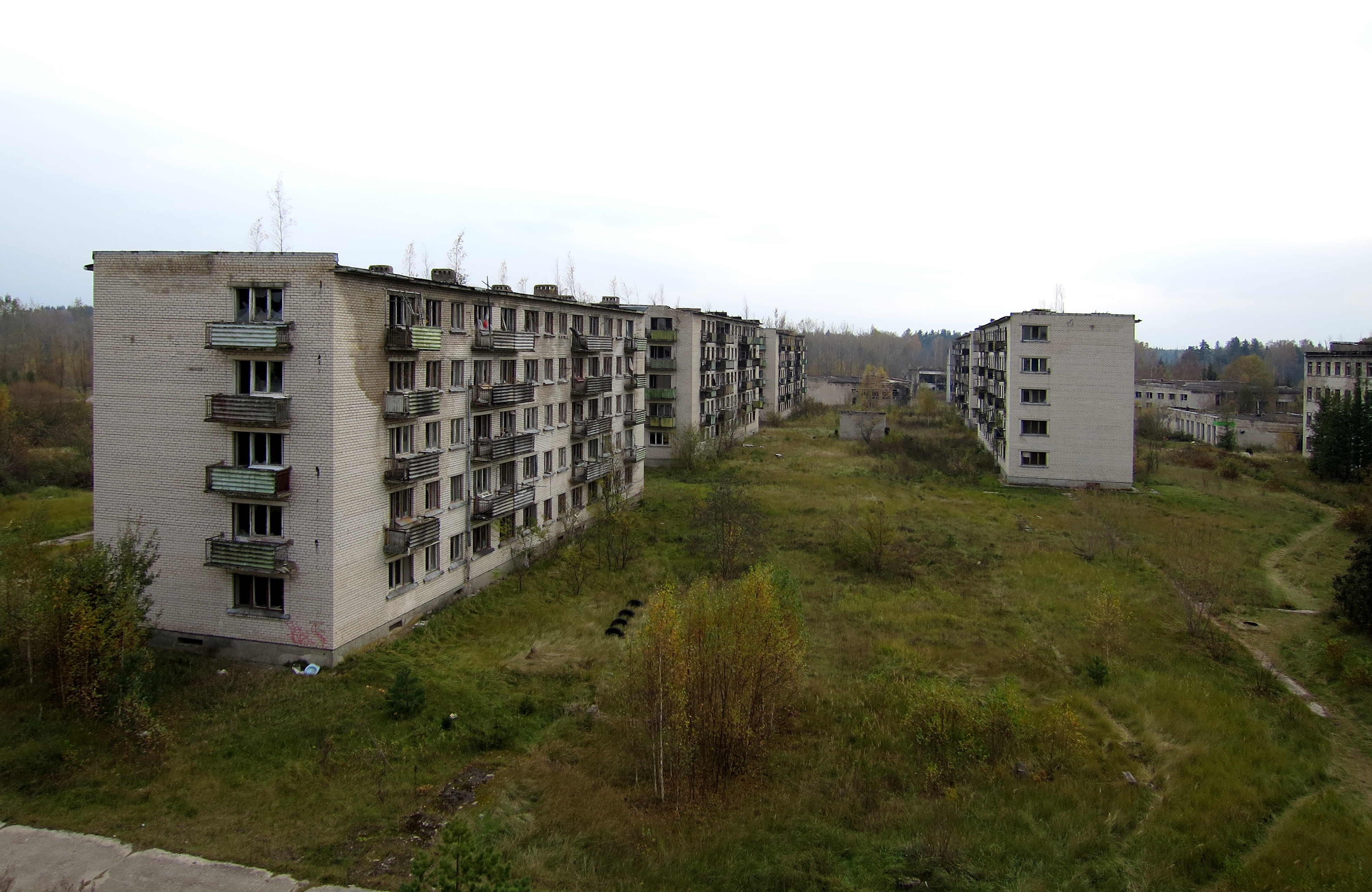 Skrundas kara pilsētiņa